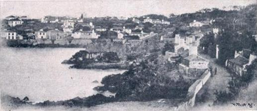 "Ilha Terceira - S. Matheus da Calheta", freguesia de São Mateus da Calheta, concelho de Angra do Heroísmo, ilha Terceira, Açores, in Álbum Açoriano, fascículo nº 40, 1903, p. 315.